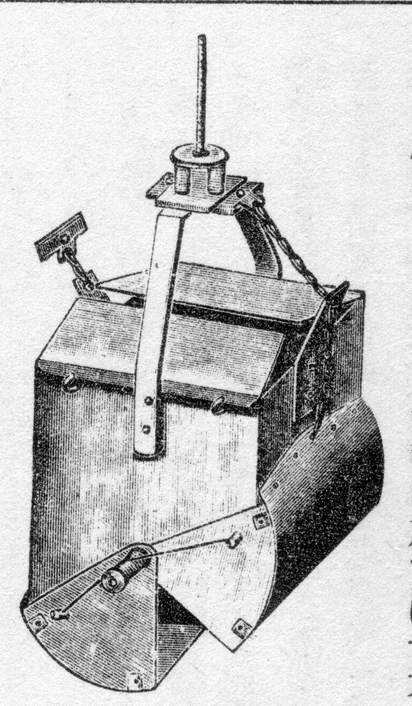 採泥器(Ekman-Birge type bottom sampler)